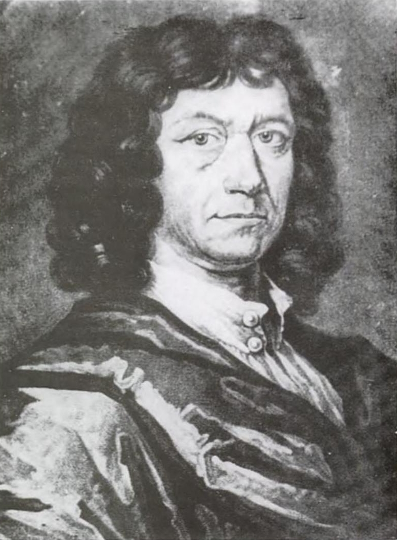 Johann Beer. Schabkunstblatt von Peter Schenk. Museum Weißenfels